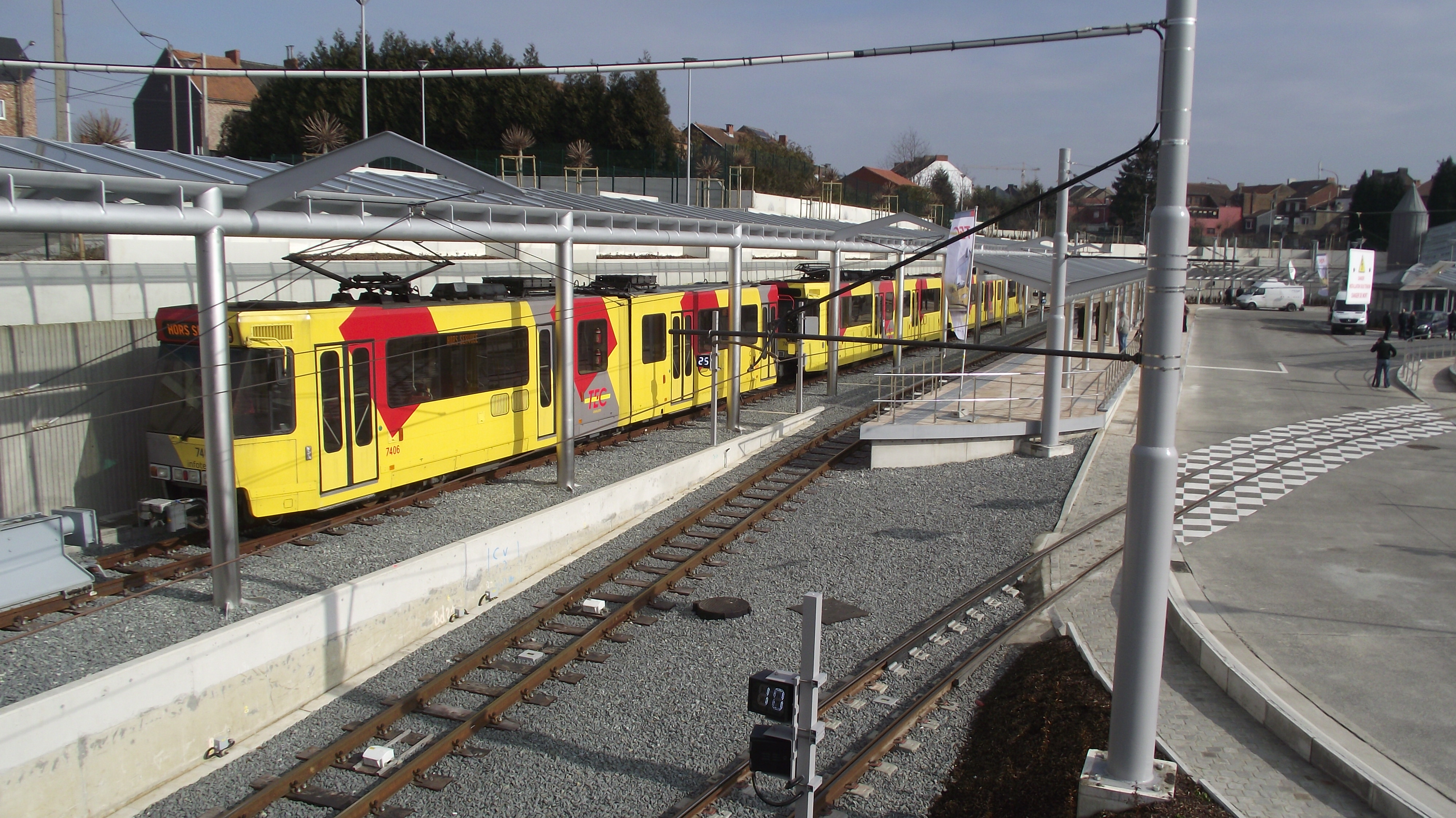 Nieuw eindpunt keerlus Soleilmont geopend op 27-02-2012. Links gestalde trams op het parkeerspoor.